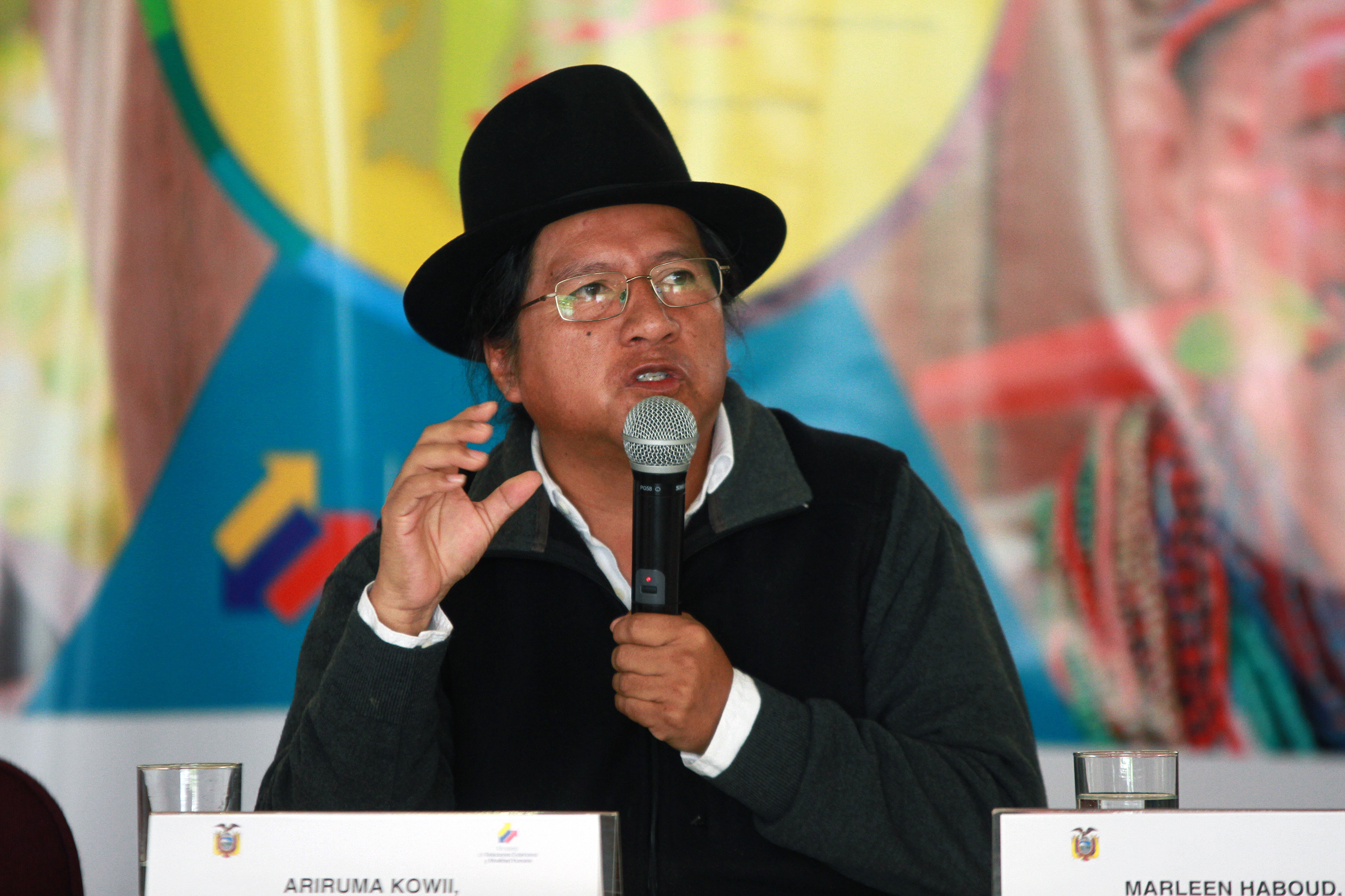 Quito, 20 feb (ANDES).- En la cancillería se celebró el día internacional de la lengua materna, con ponencias de expertos como Marleen Haboud y Ariruma Kowii. Fotografías: Carlos Rodríguez/ANDES.